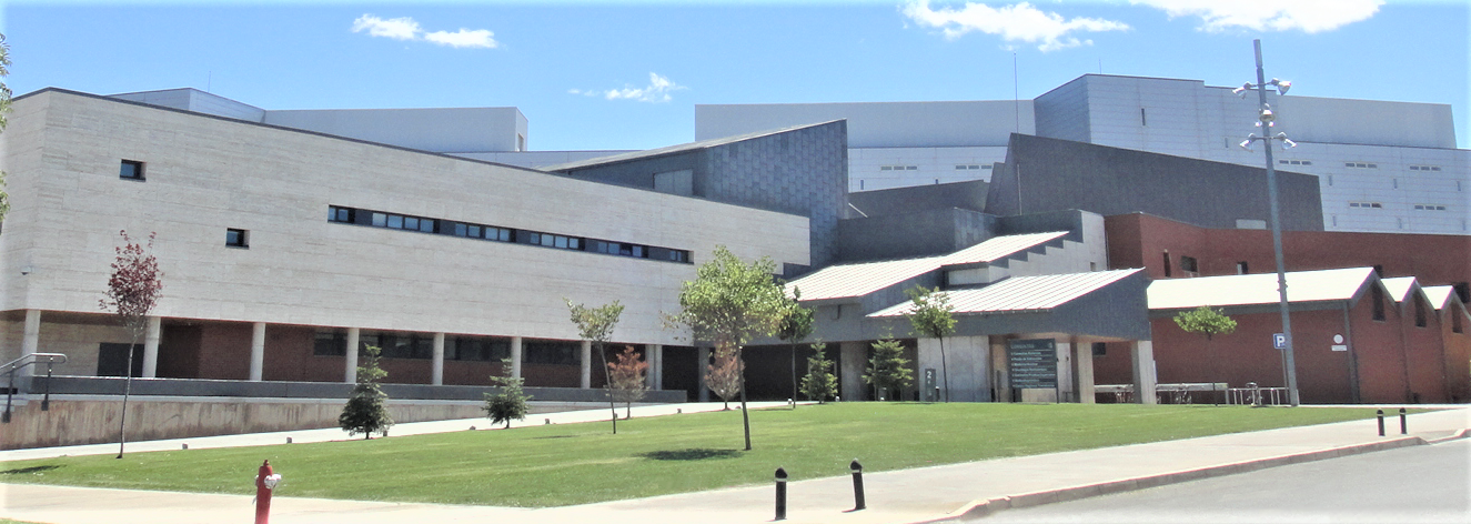 Hospital General Universitario de Ciudad Real, acceso a urgencias. Inaugurado en 2005, en Ciudad Real - España.